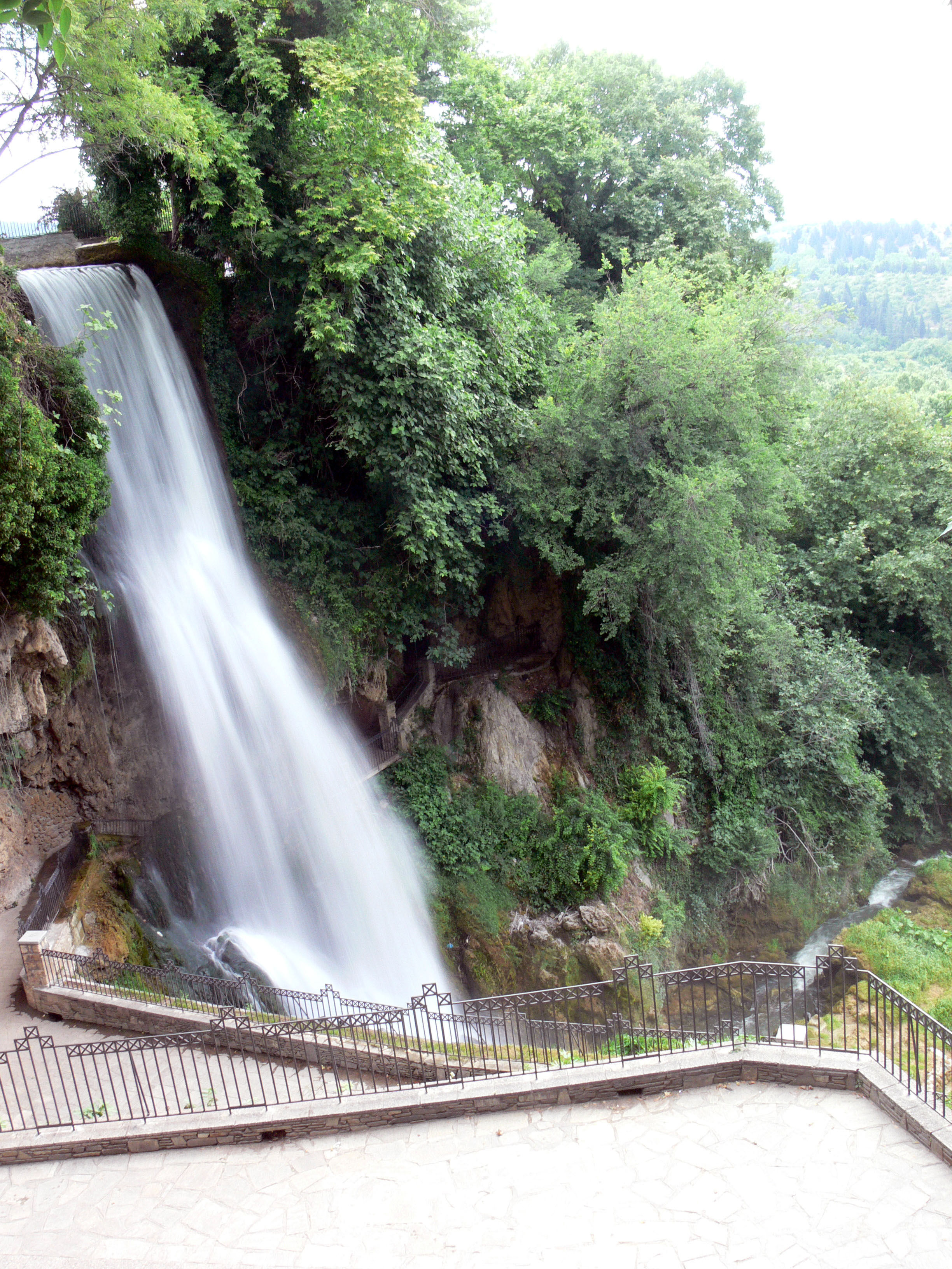 Водопад във Воден, Егейска Македония, Гърция.